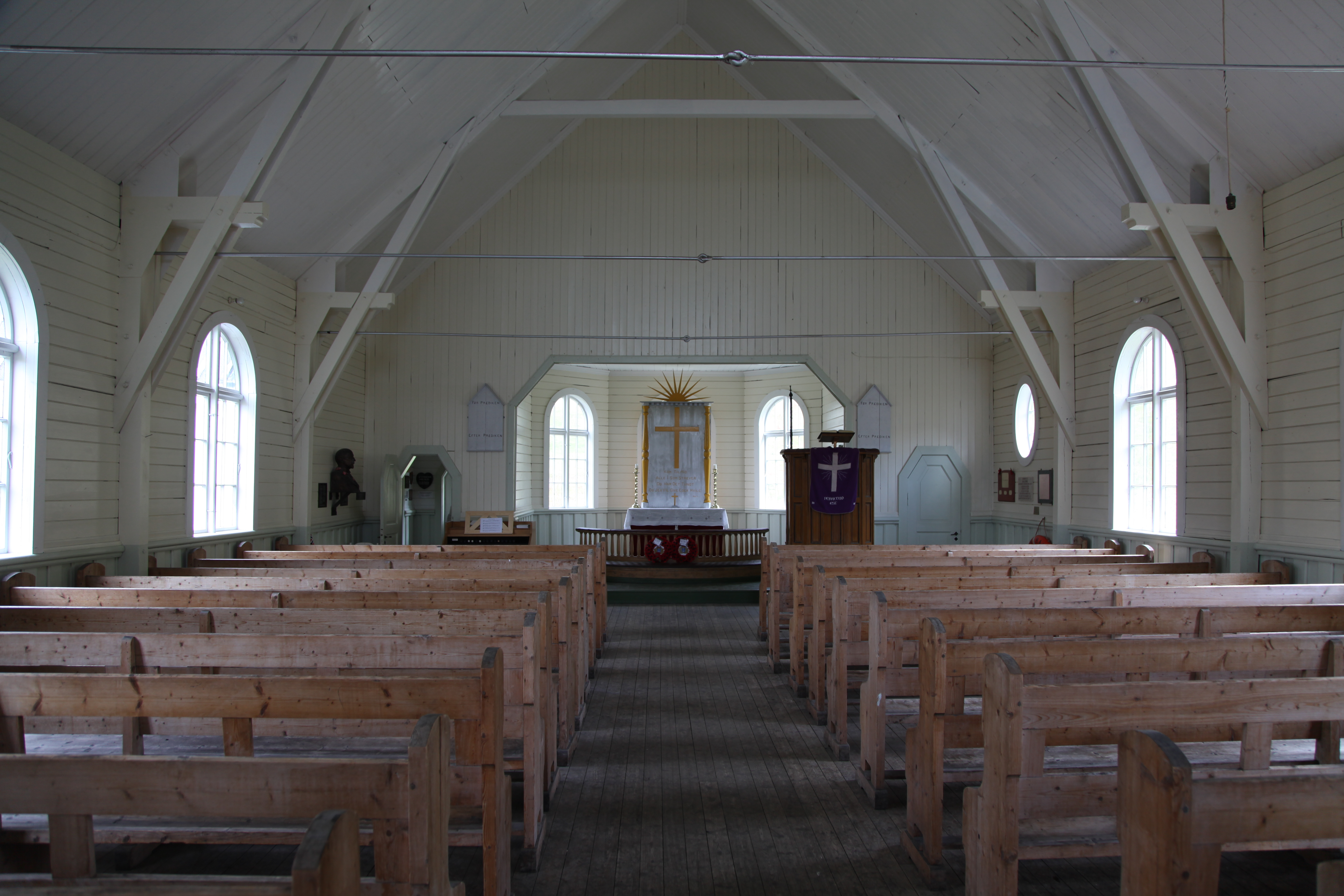 Interior